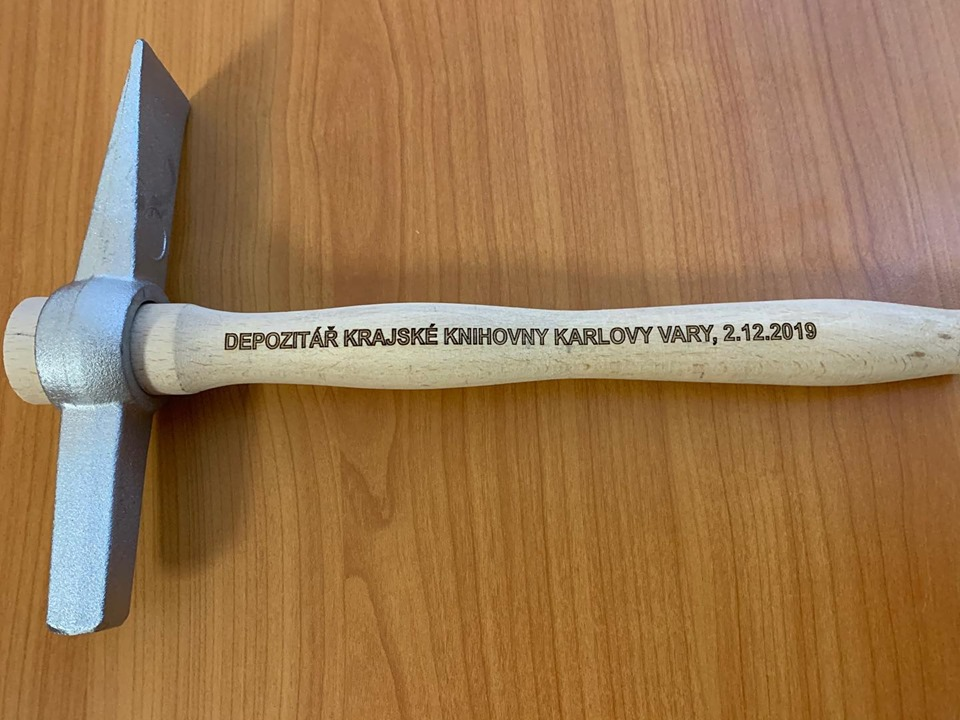 Symbolické kladívko, kterým byla zahájena výstavba nového depozitního skladu.